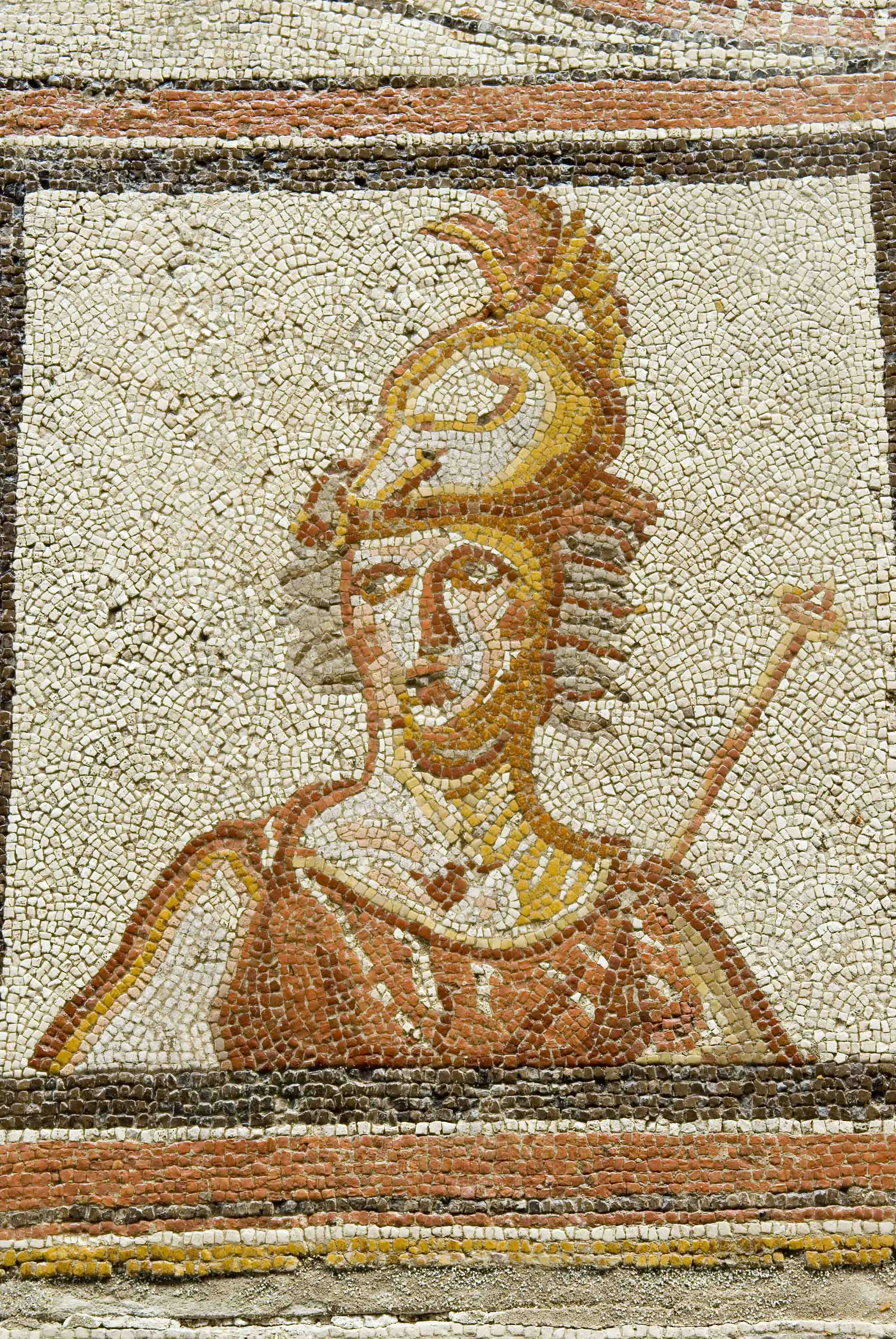 Detalle del mosaico de Las Metamorfosis, Villa Romana de Carranque